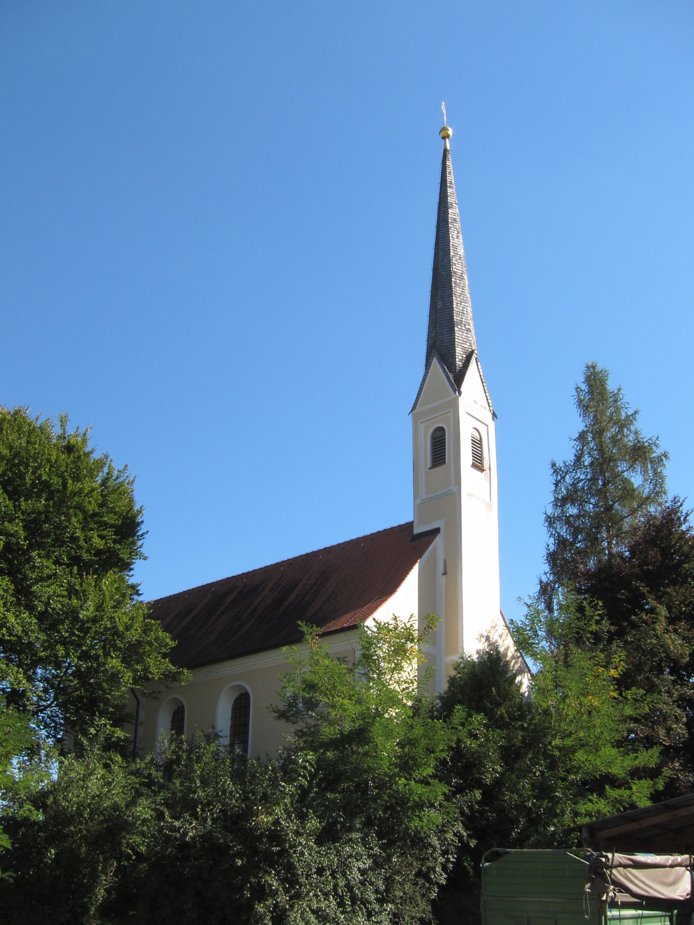 Katholische Filialkirche St. Florian, barocker Saalbau mit eingezogenem Rechteckchor und schmalem Spitzhelmturm, von Hans Kogler, 1680; mit Ausstattung.